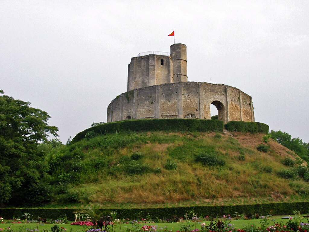 Donjon du château de Gisors (Eure) Photo JH Mora, juin 2005